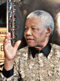 Brasília - O presidente da África do Sul, Nelson Mandela, é recebido na capital federal.